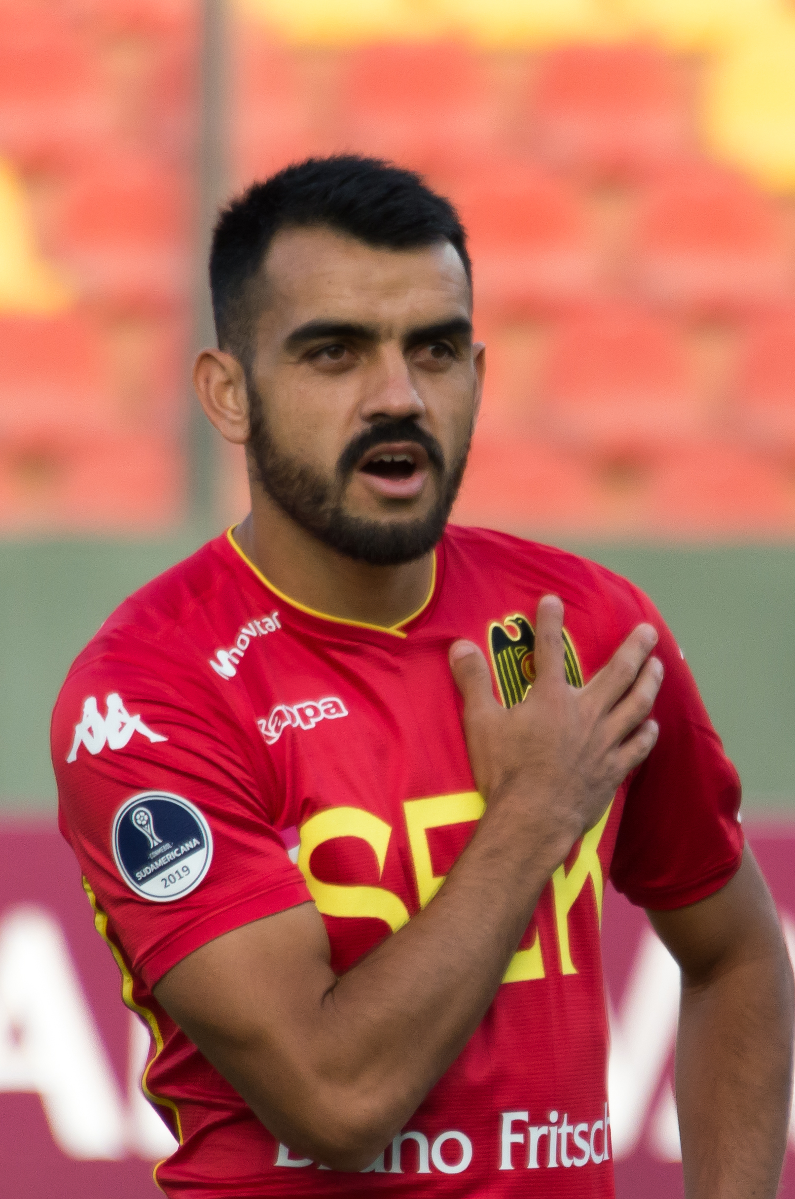 Misael Dávila, Unión Española v Mushuc Runa, Estadio Santa Laura, Independencia, Santiago, Región Metropolitana, Chile.